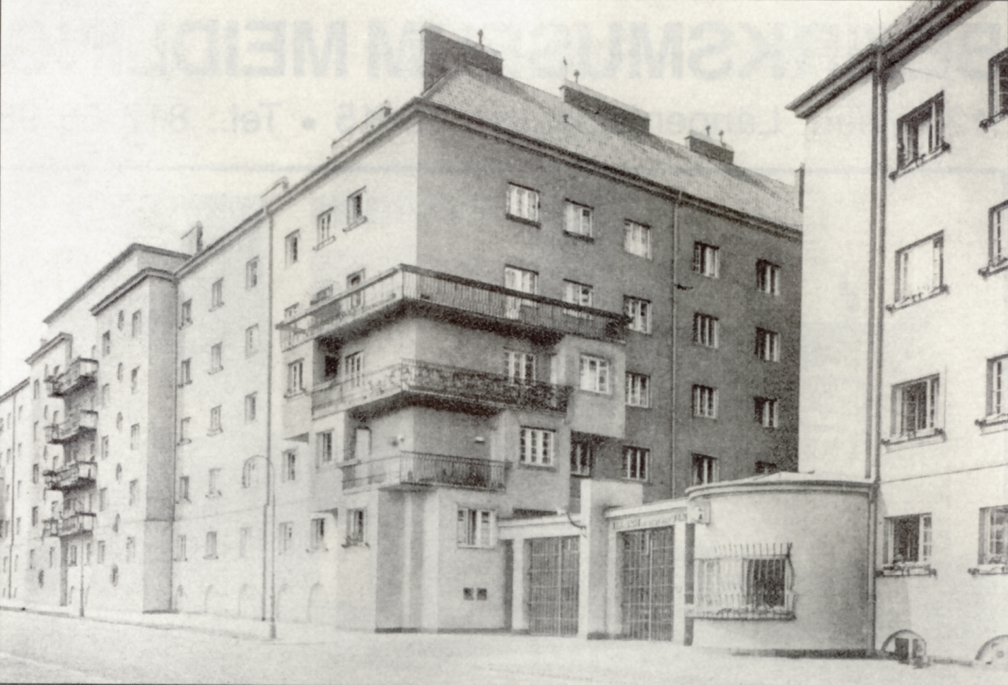 Wohnhausanlage Am Wienerberg in Wien-Meidling, östlicher Bauteil; Architekten Perco Rudolf, Frass Rudolf, Dorfmeister Karl, 1925-27, Seite Pirkebnerstraße, Foto 1930